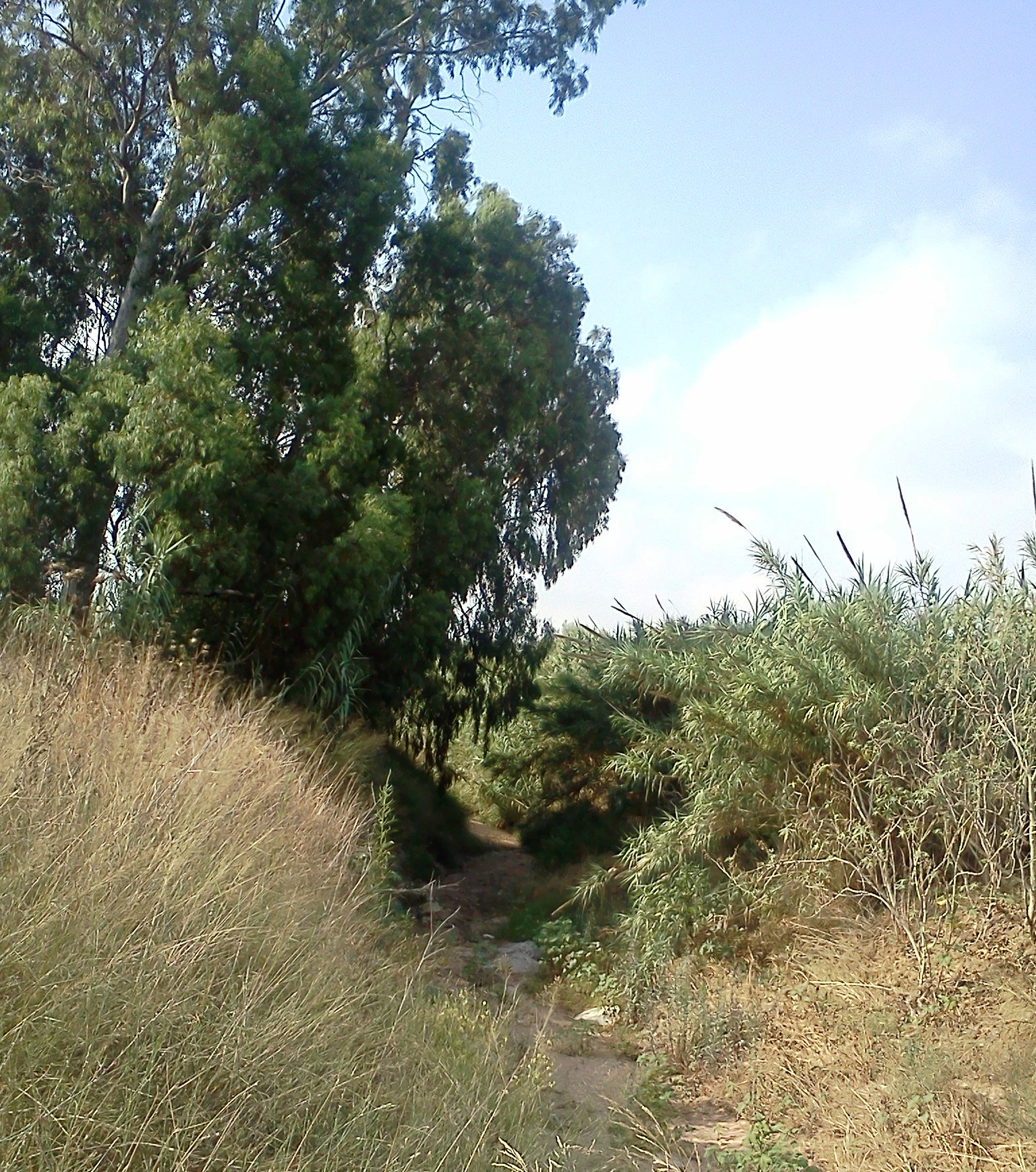 נחל הדר באזור המיועד לפתוח